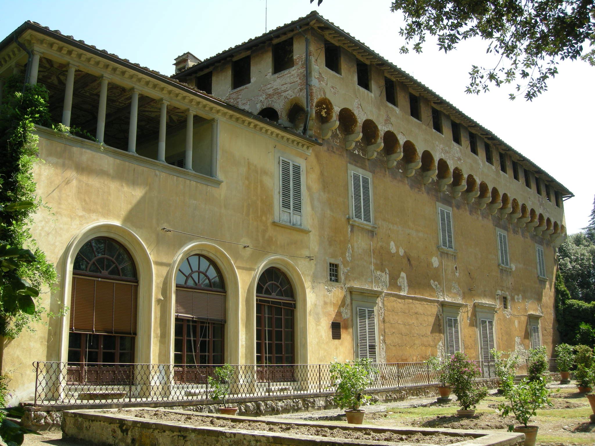 Villa di careggi 11.1